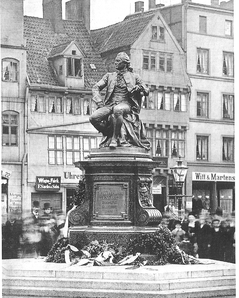 Lessing-Denkmal von Fritz Schaper auf dem Gänsemarkt in Hamburg-Neustadt, 1881